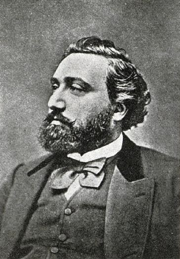 Léon Gambetta en 1870.